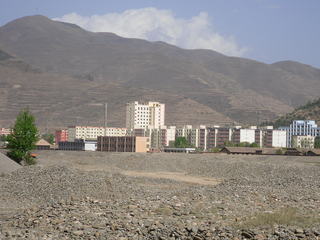 甘肃岷县洮河河床